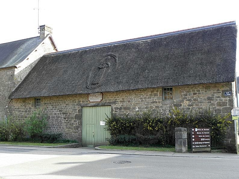 Grange de l'apparition de Pontmain (53).